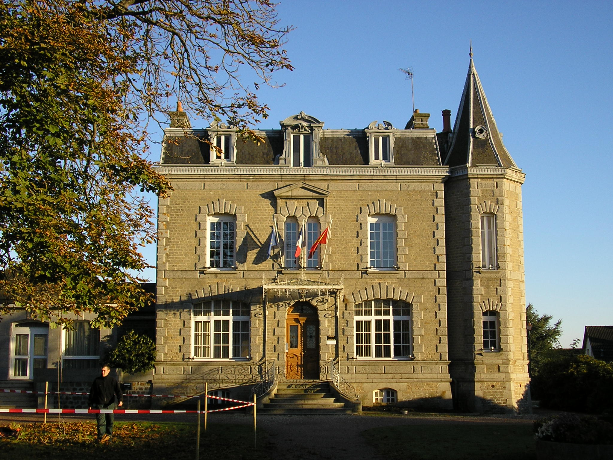 mairie de Briouze(orne)